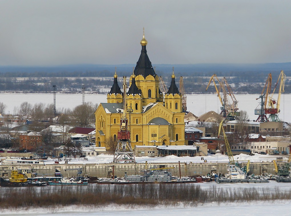 Ансамбль собора Александра Невского (Нижегородская область, Нижний Новгород, улица Стрелка, 3)